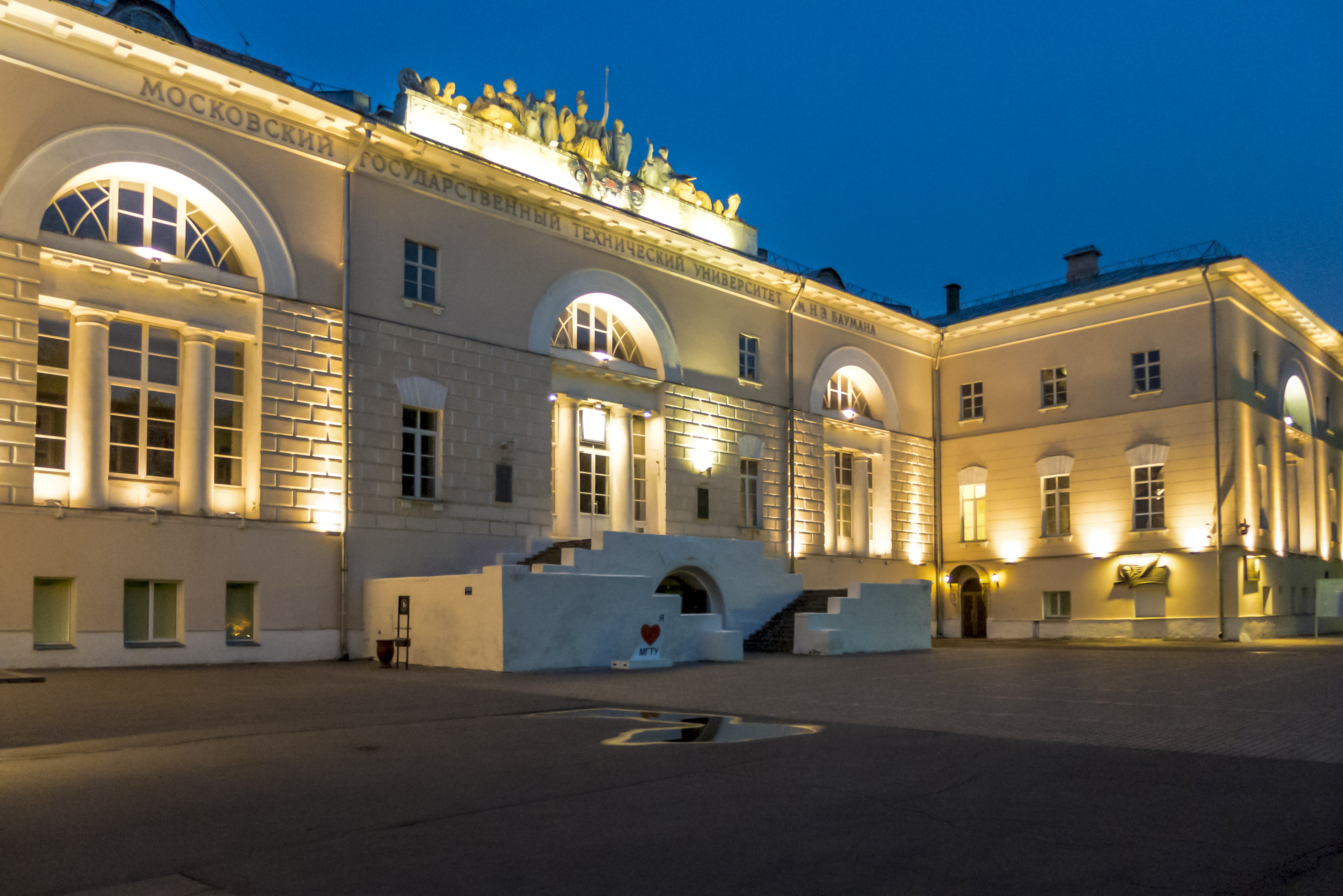 Техническое училище: Бауманская 2-я ул., д.5, стр.1, Басманный, Центральный округ, Москва